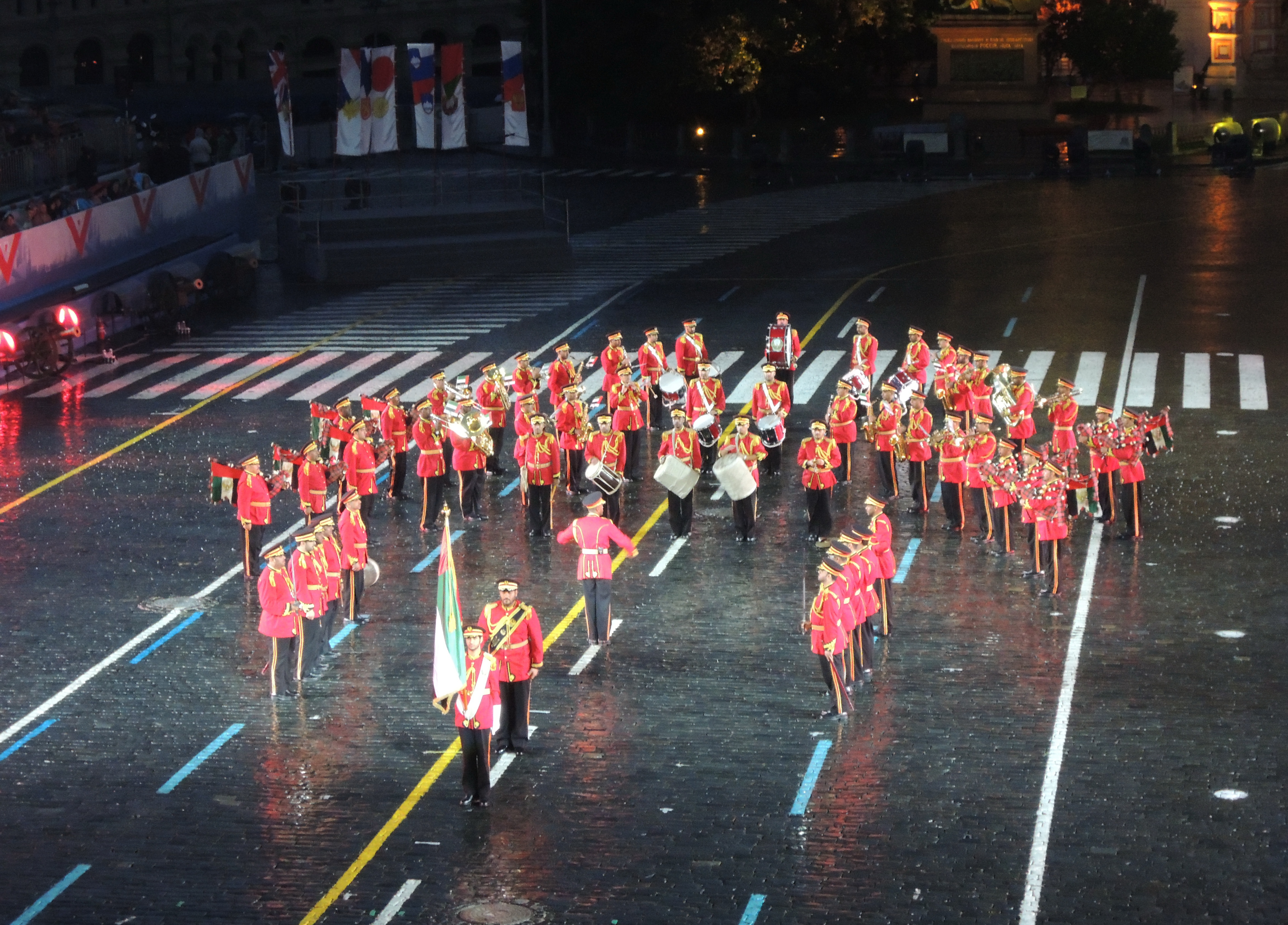 Спасская башня (фестиваль)